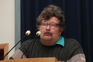 Георгий Жарков выступает на Конгрессе МАК.